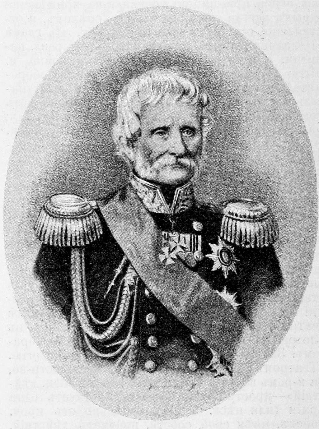 Это изображение было использовано для иллюстрирования статьи «Жомини, Генрих, барон» опубликованной в десятом томе «Военной энциклопедии», который был издан книгоиздательским товариществом И. Д. Сытина в 1912—1913 гг. в столице Российской империи городе Санкт-Петербурге.